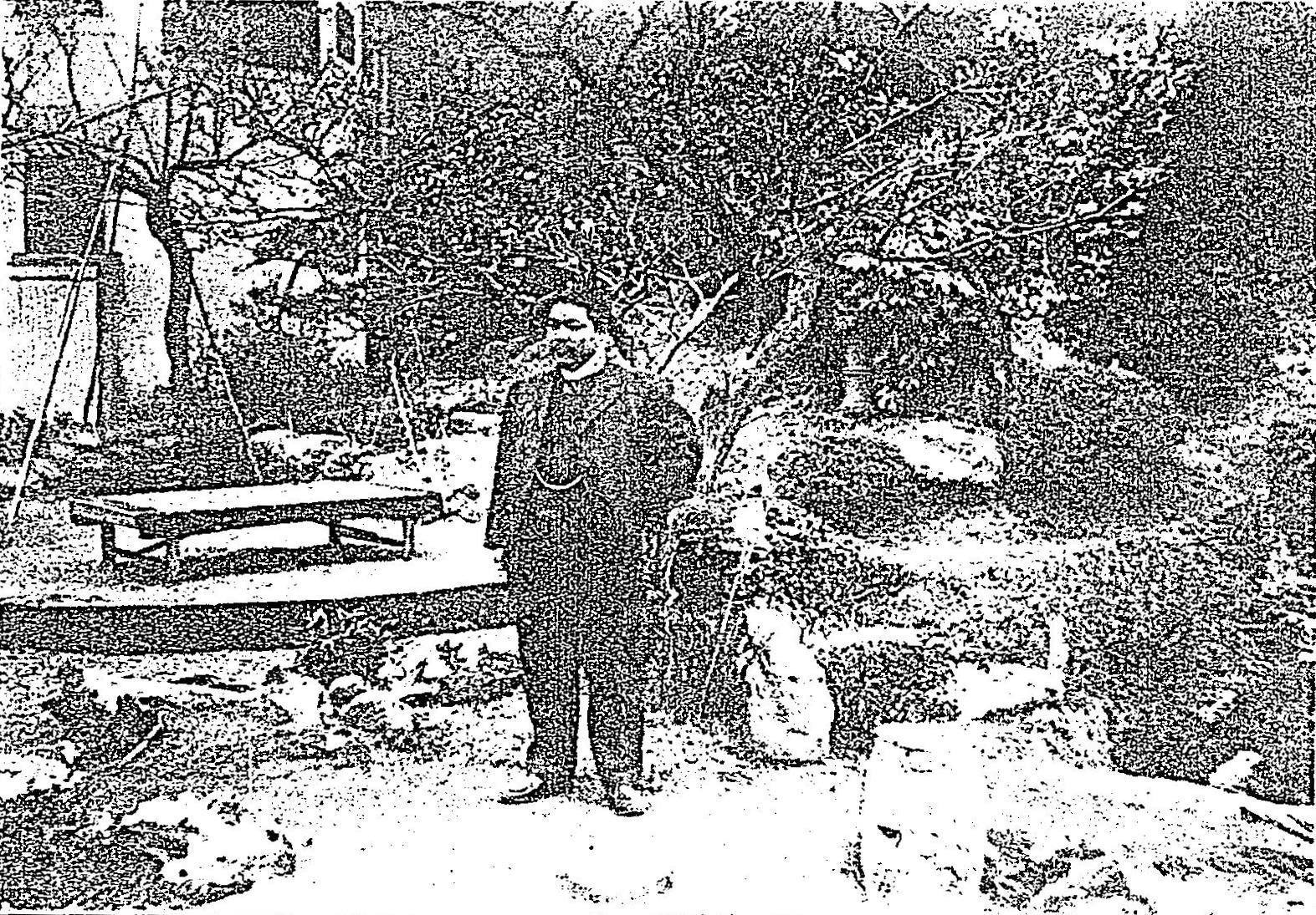 鎌倉観梅の際における国府犀東